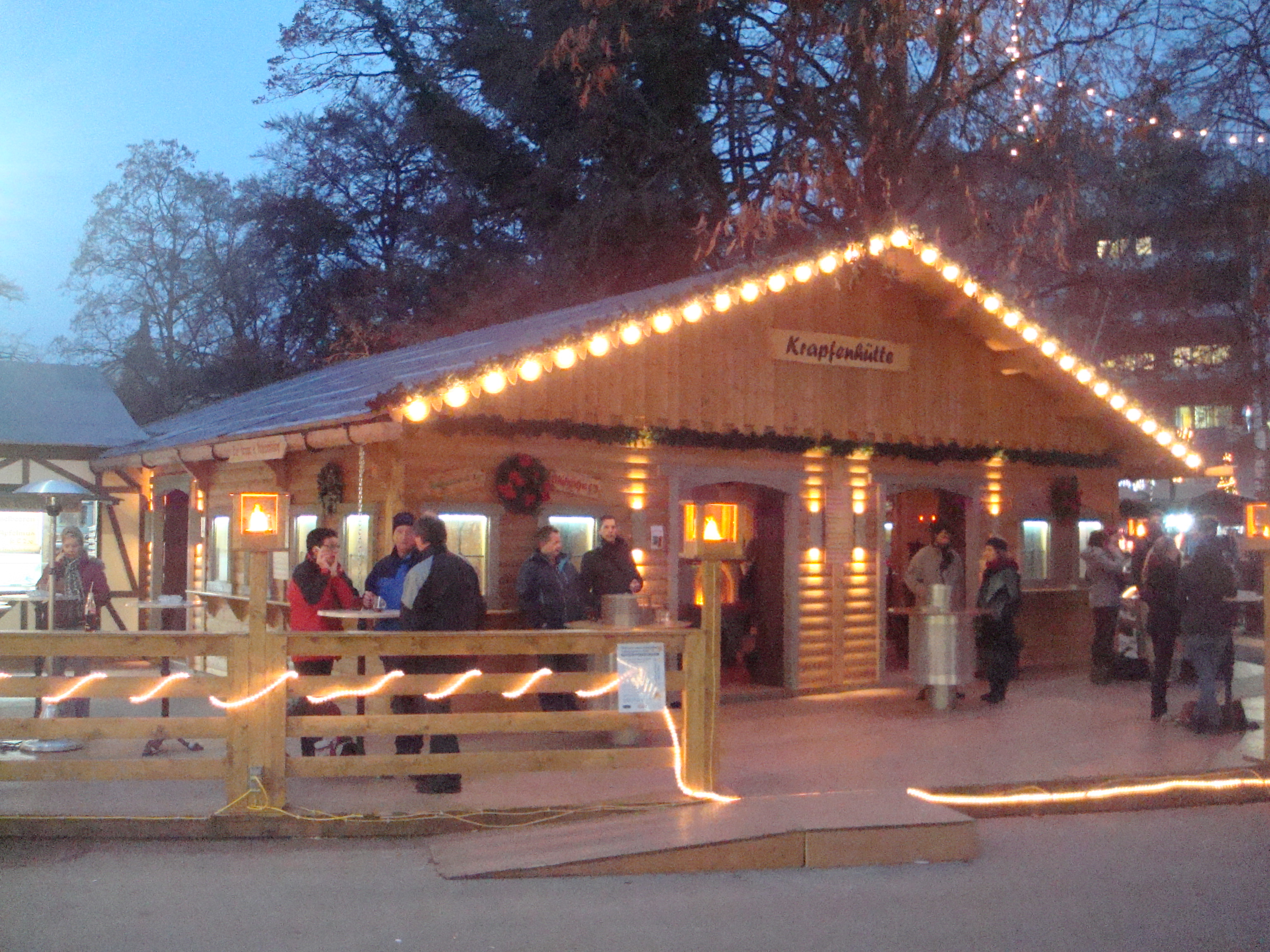 Volksgarten Linz Krapfenhütte